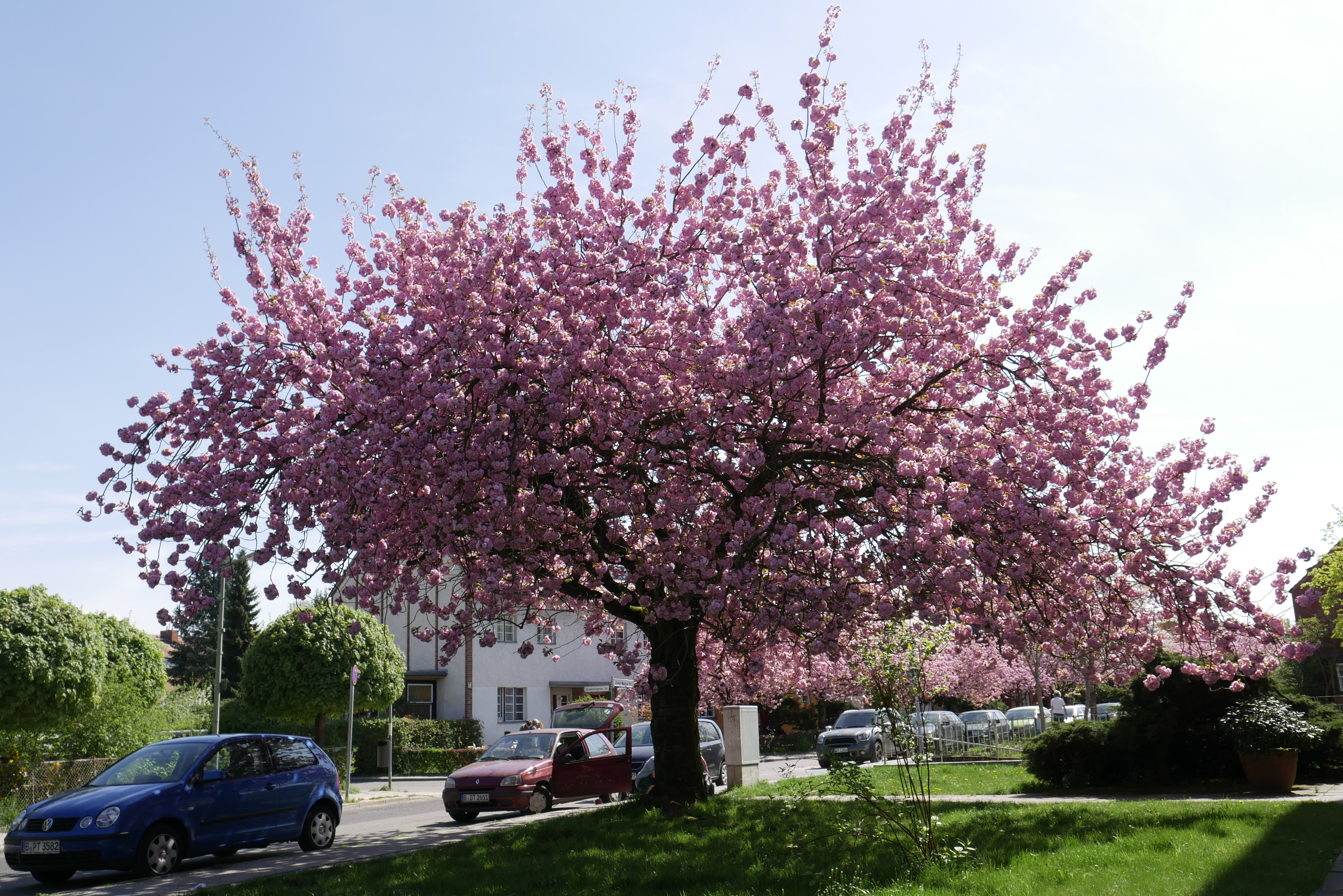 Japanische Kirschblüte bei King Kennys Castle in Berlin Britz